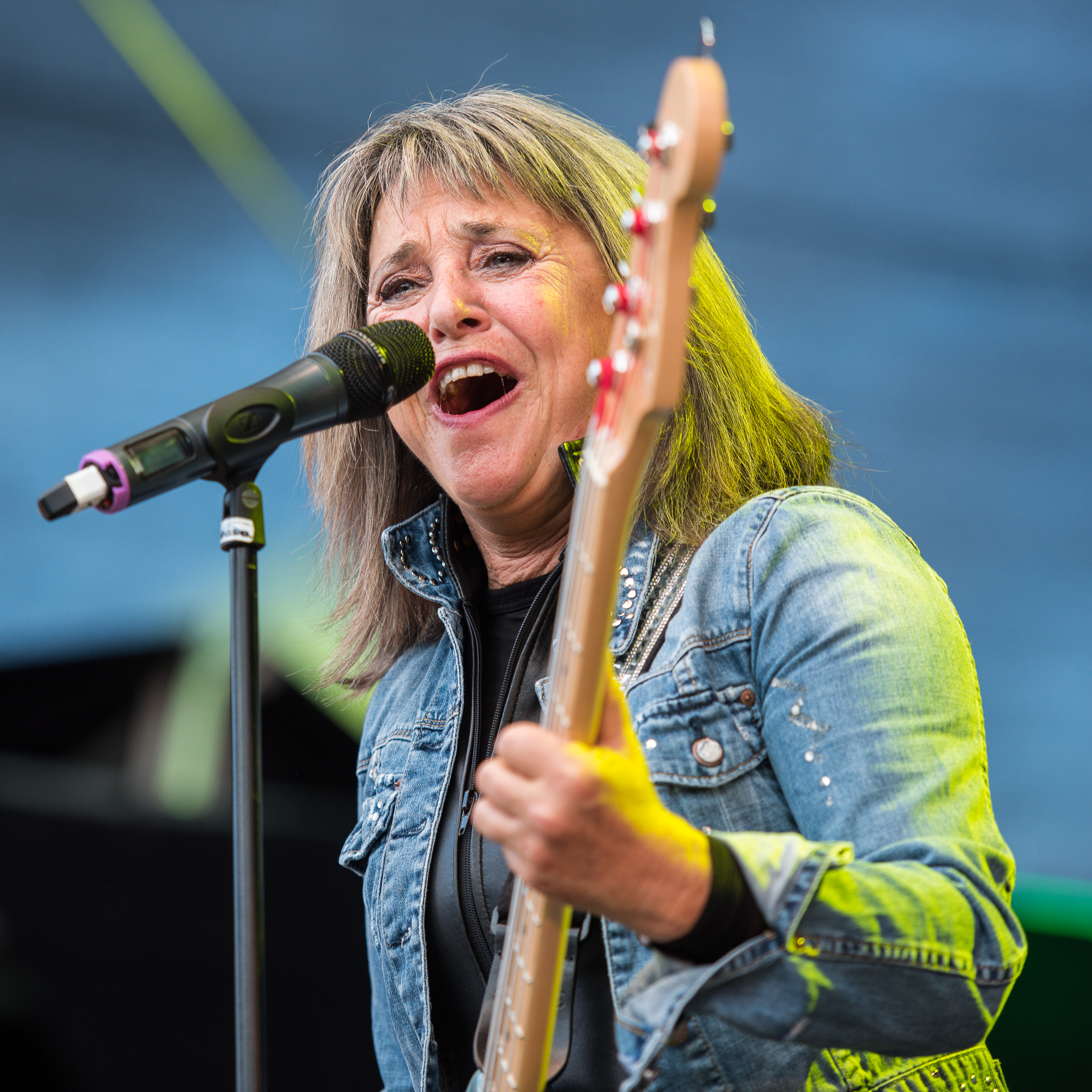 Brombachsee,Concertbüro Franken,Festival,Konzert,Lieder am See,Livekonzert,Livemusik,Musik,Susan Kay Quatro,Suzi Quatro